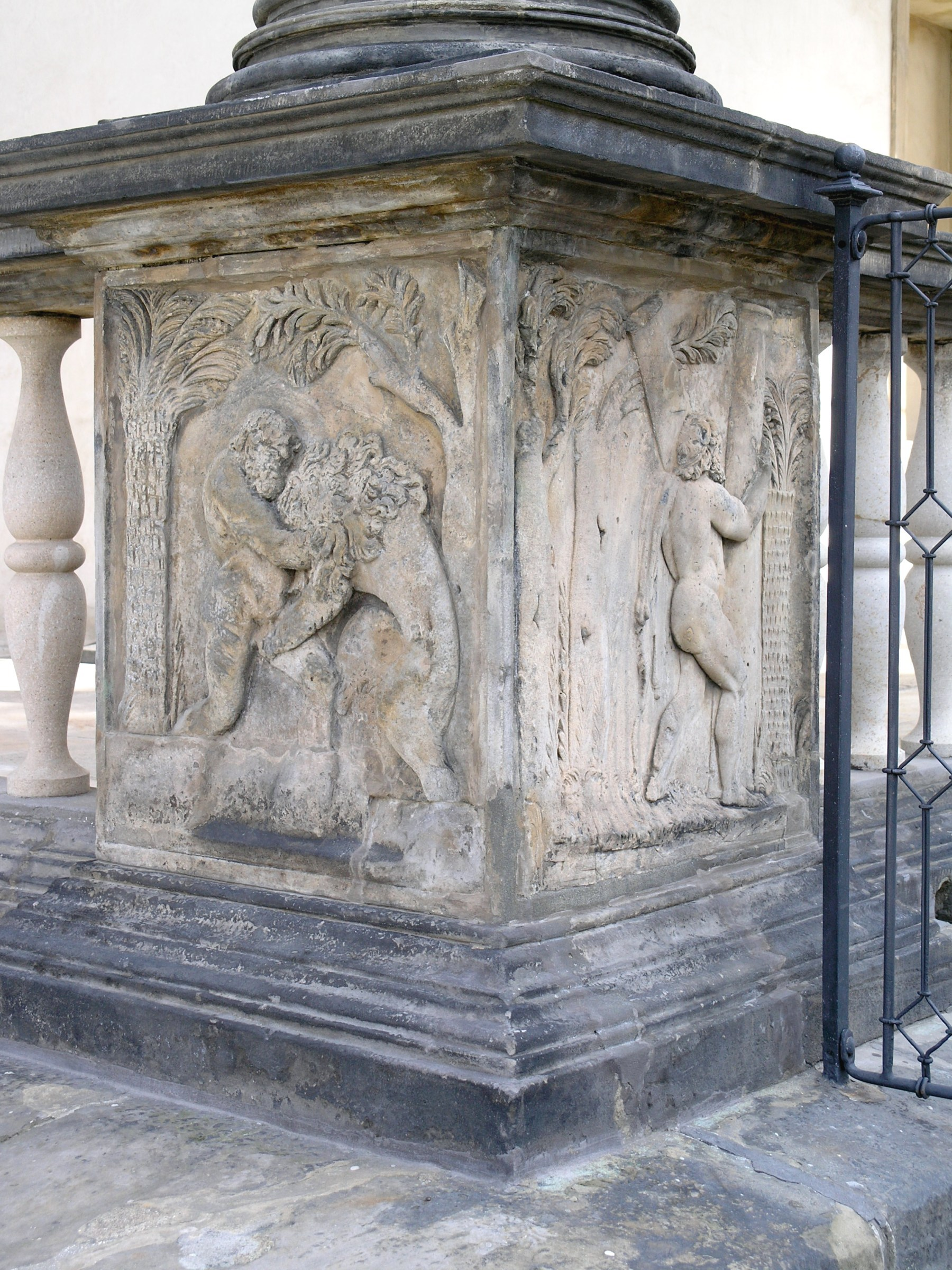 Praha, Hradčany - Letohrádek královny Anny, reliéfní výzdoba (SZ roh)